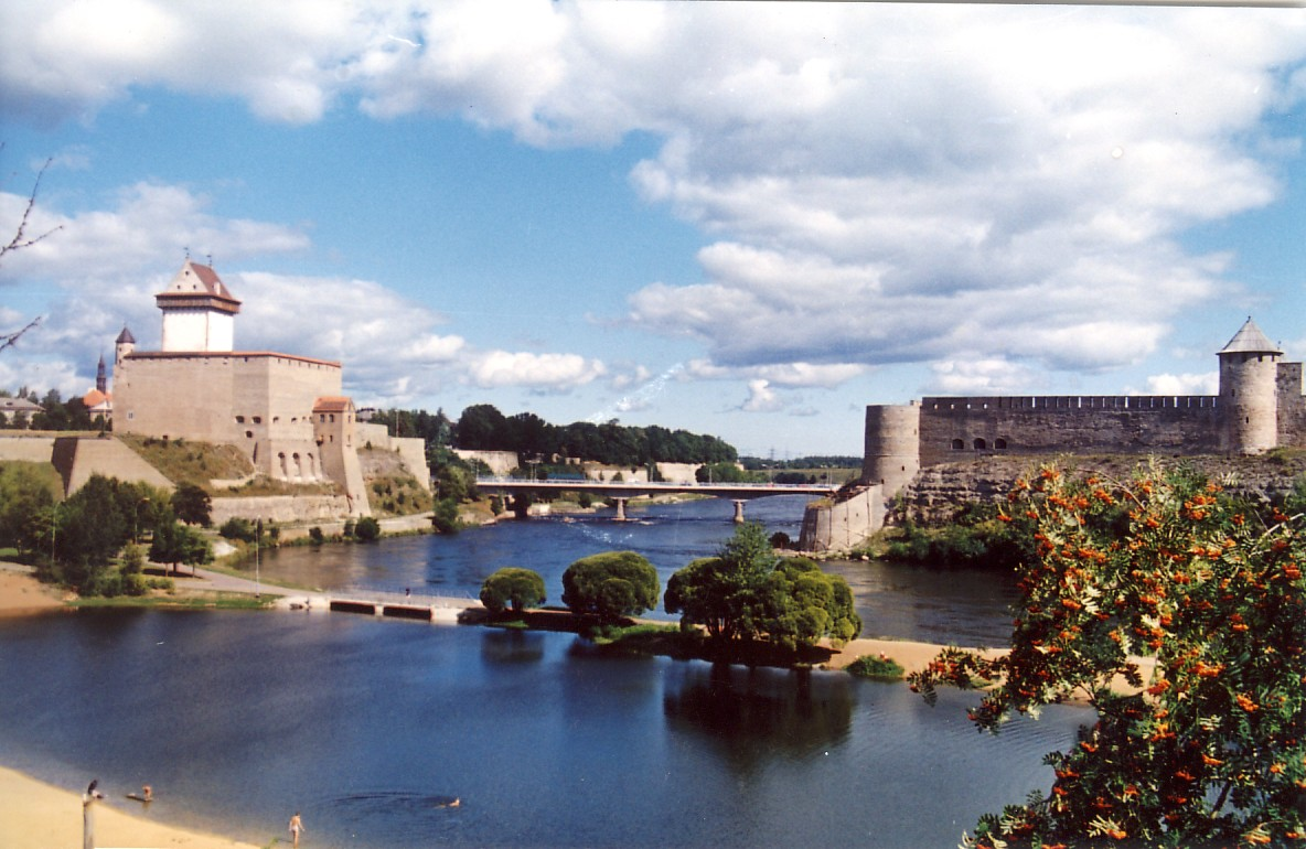 License details (Russian): От кого:stepanco at mvd.ee Кому: sliva-ivan at mail.ru Дата: 13 Мар 2006 17:47:48 Тема: Otvet Zdrastvuite! Eto foto pomestil gost nashego saita, my ne znaem avtora poetomu mozno ispol'zovat' prosto tak